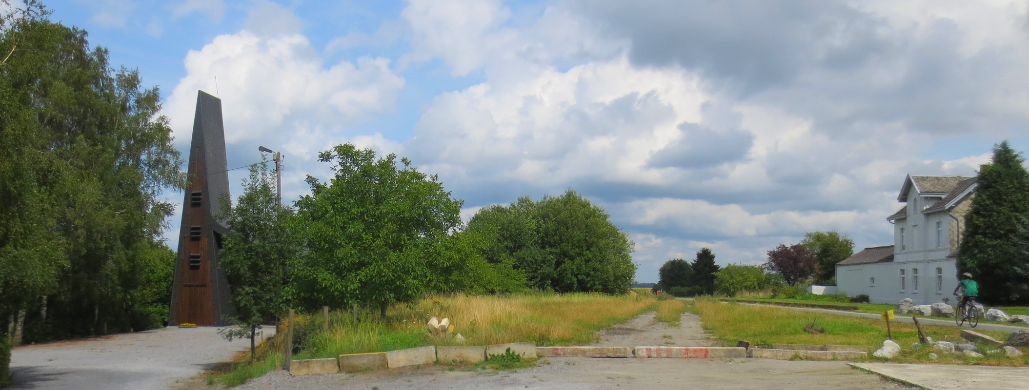 Villers-la-Tour